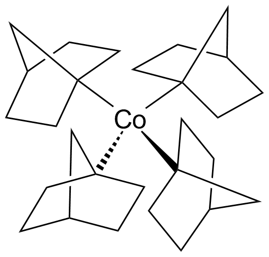 Struktur des tetraedrischen, low-spin Cobalt(IV)-Komplexes mit 1-Norbornyl-Liganden.